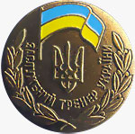 Знак к почётному спортивному званию «Заслуженный тренер Украины»